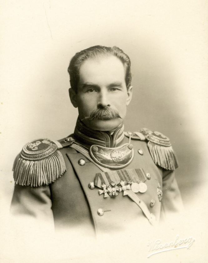 Козлов, Пётр Кузьмич Эта фотография была использована для иллюстрирования статьи «Козлов, Петр Кузьмич» опубликованной в тринадцатом томе «Военной энциклопедии», который был издан книгоиздательским товариществом И. Д. Сытина в 1913 году в столице Российской империи городе Санкт-Петербурге. Более подробное описание к этой картинке можно прочесть в указанной выше статье.